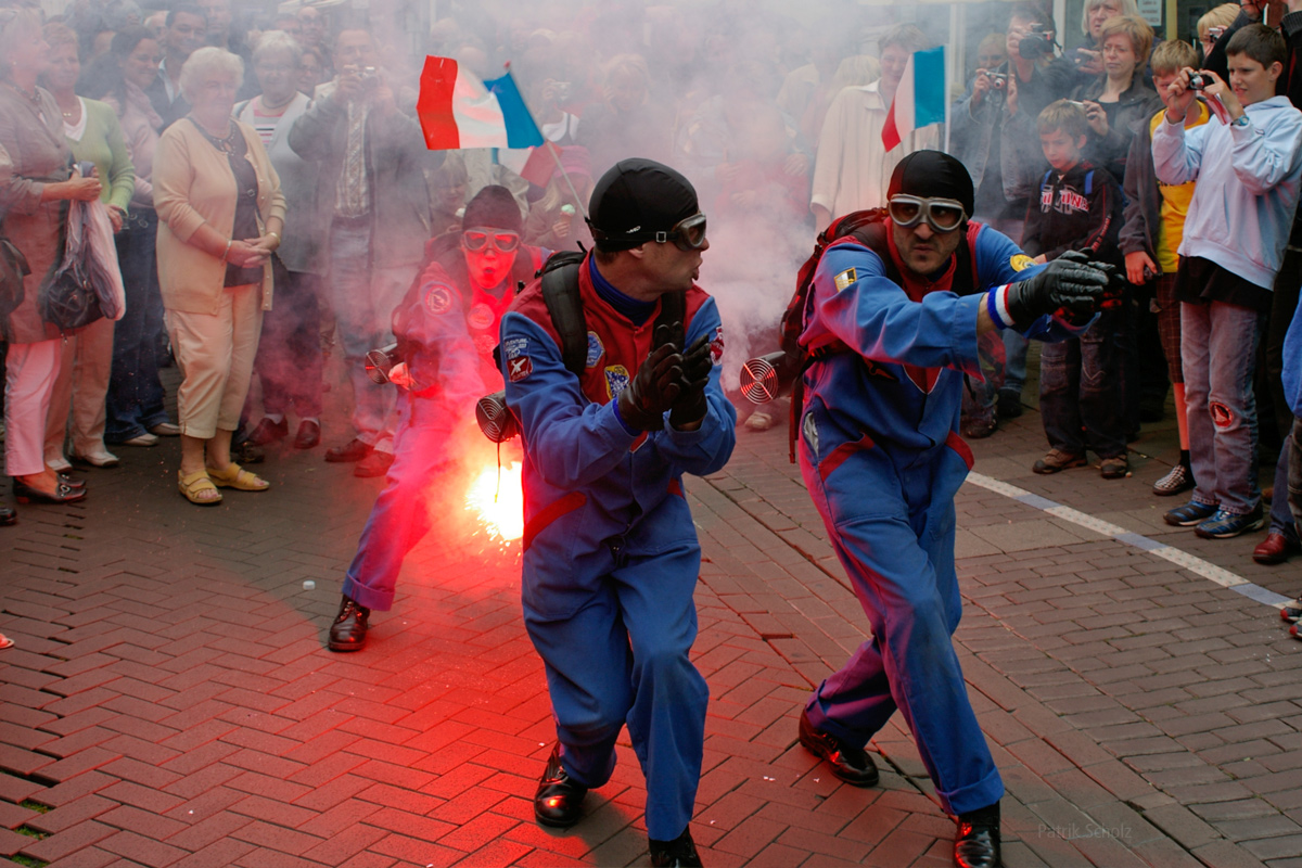 Compagnie Colbok beim 10. Internationalen Straßentheaterfestival in Holzminden 2009